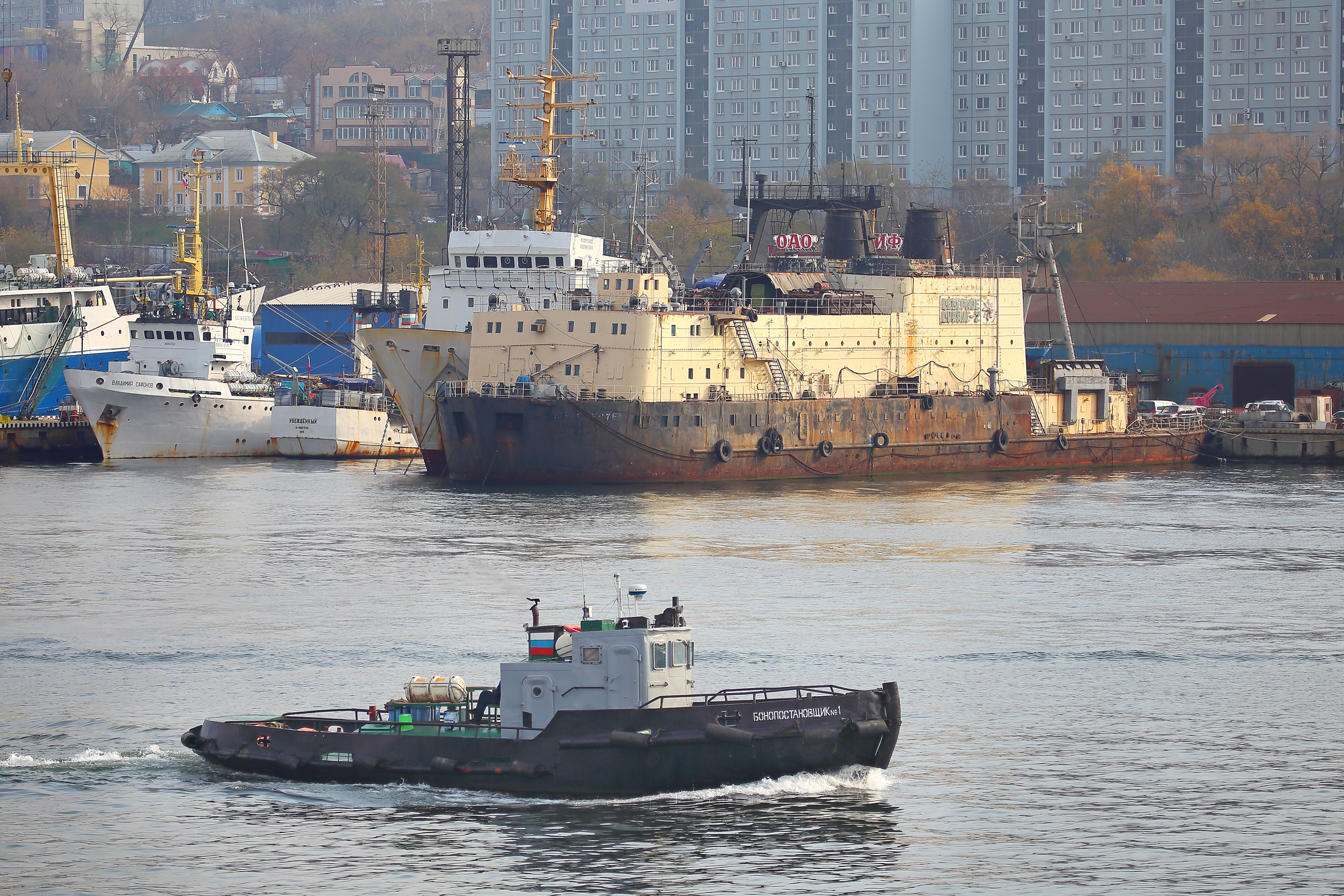 Бонопостановщик№1 и Северное Сияние-2